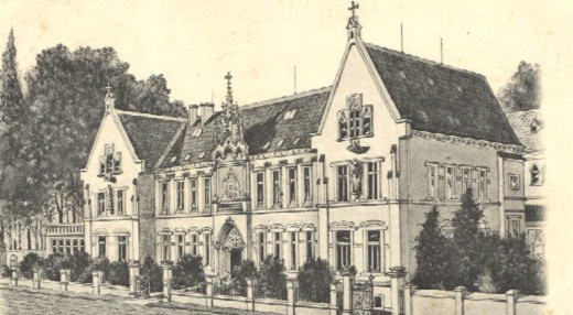 Ursulinenkloster